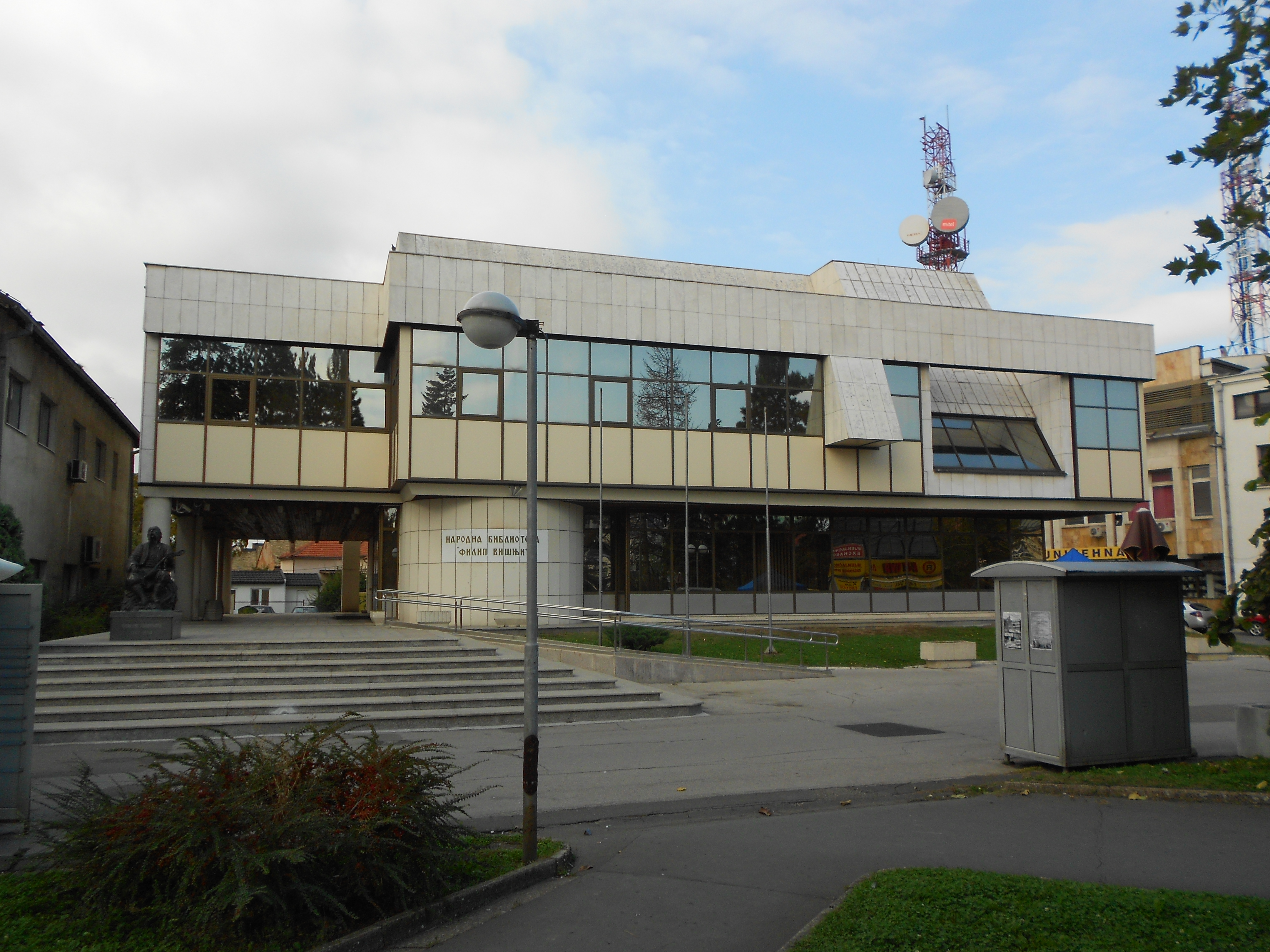 Народна библиотека Филип Вишњић у Бијељини